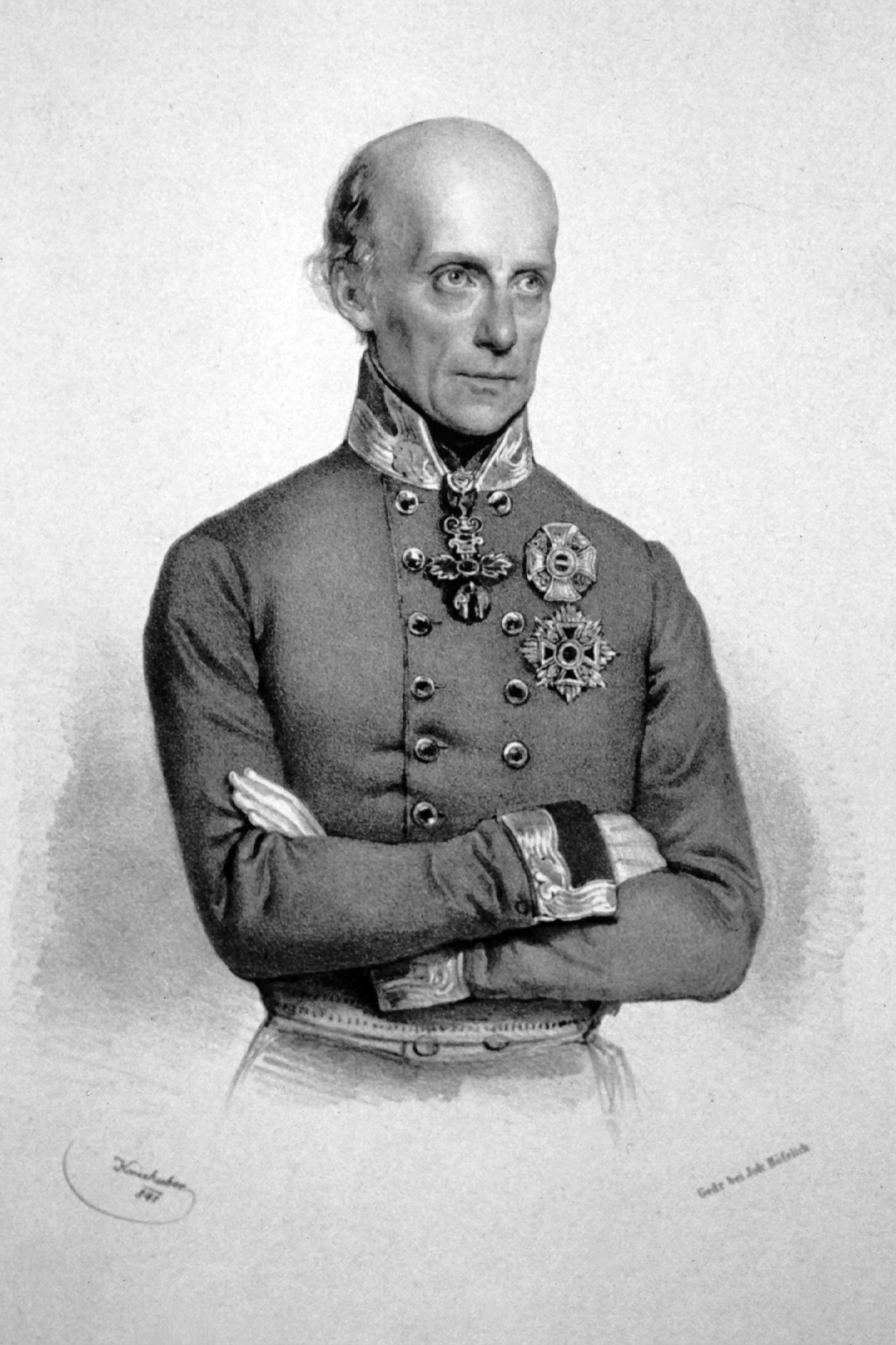 Johann von Österreich (1782-1859), Erzherzog, Reichsverweser